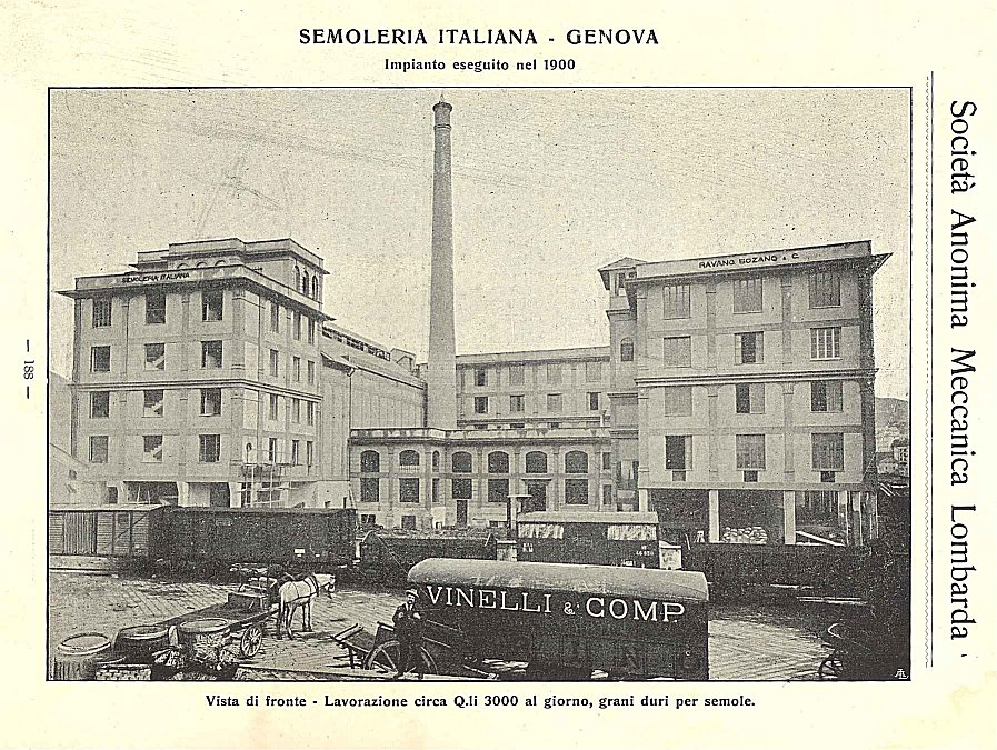 Semoleria italiana Genova - vista di fronte